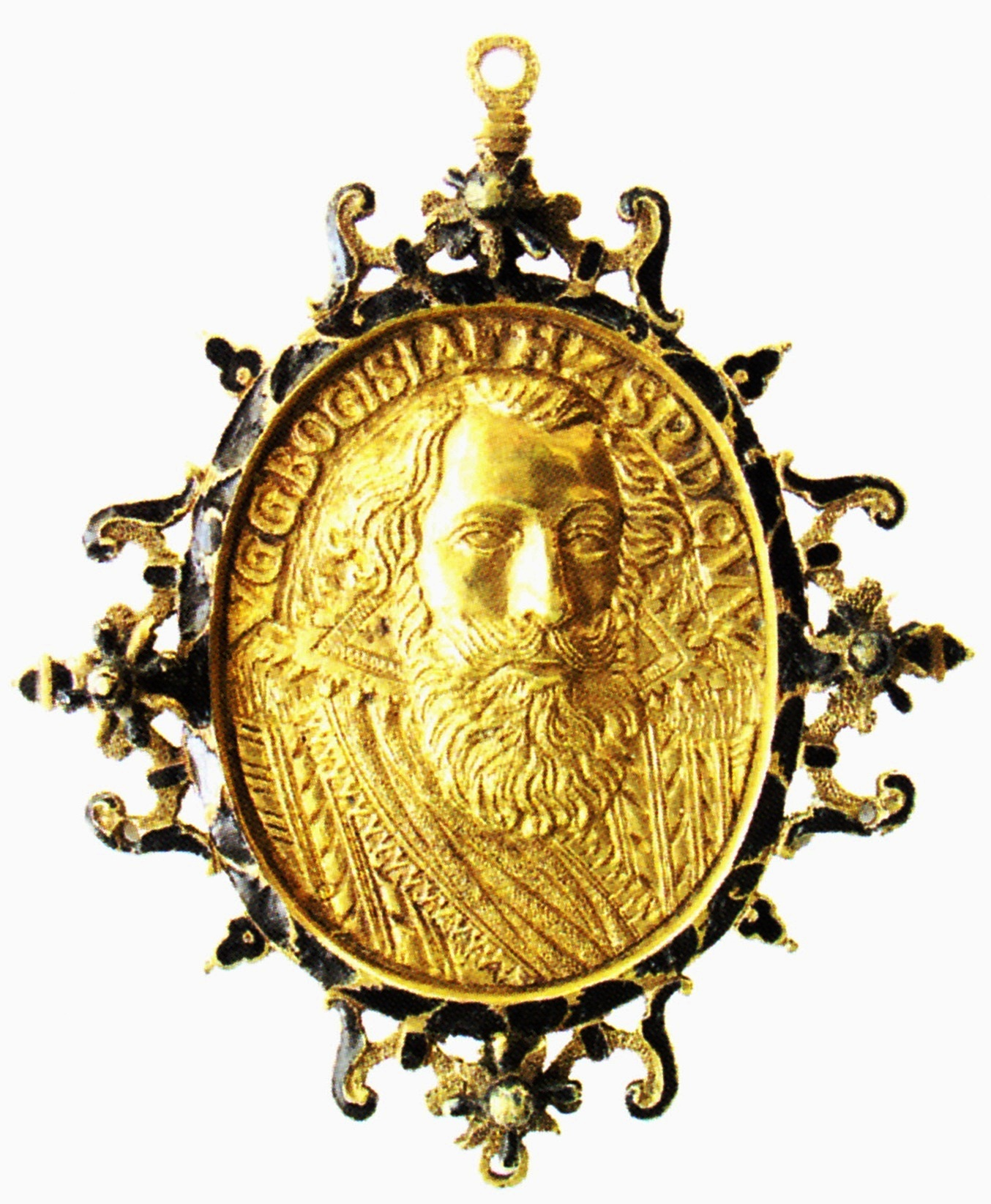 Gnadenpfennig (Bildnismedaille) von Herzog Bogislaw XIV. von Pommern. Inschrift: V.G.G.BOGISLAF.H.Z.S.P.D.C.V.W. (von Gottes Gnaden Bogislaw, Herzog zu Stettin, Pommern, der Cassuben und Wenden)